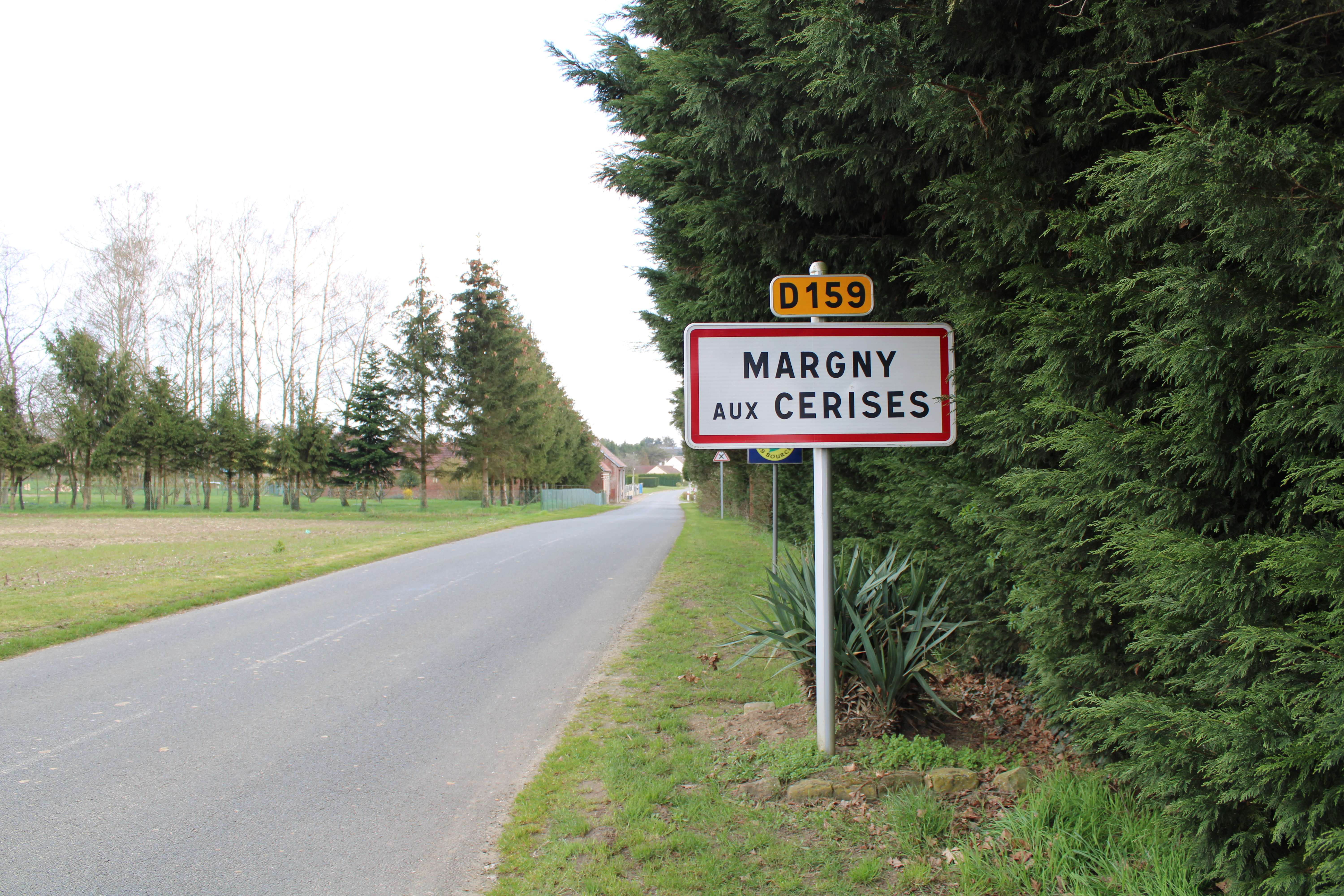 Entrée du village.